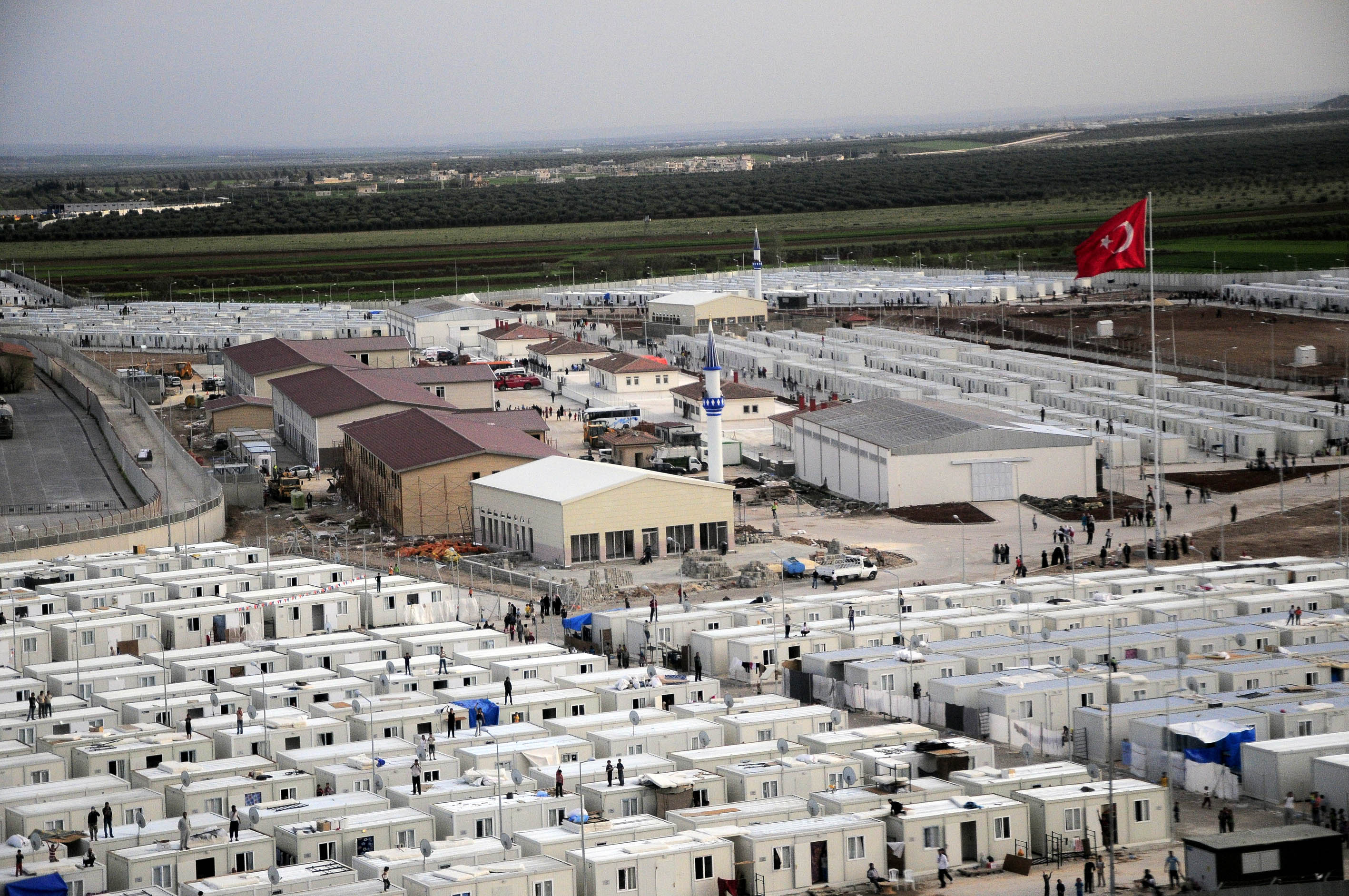 AFAD Kilis kamp